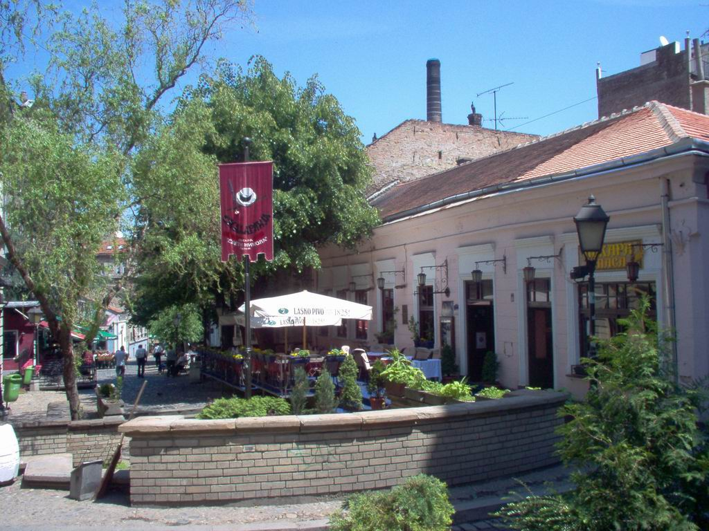 Улаз у Скадарлију са горње стране, Београд